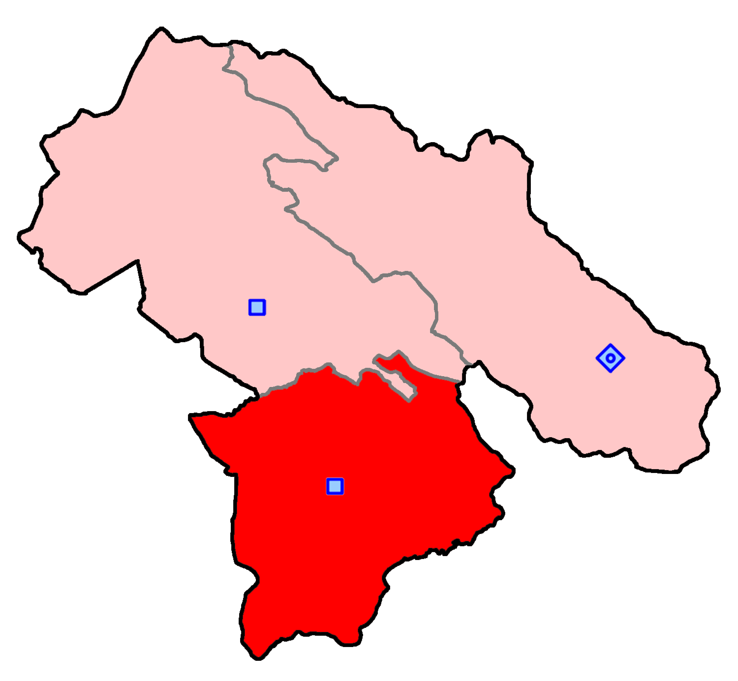 حوزهٔ انتخاباتی گچساران برای انتخابات مجلس شورای اسلامی